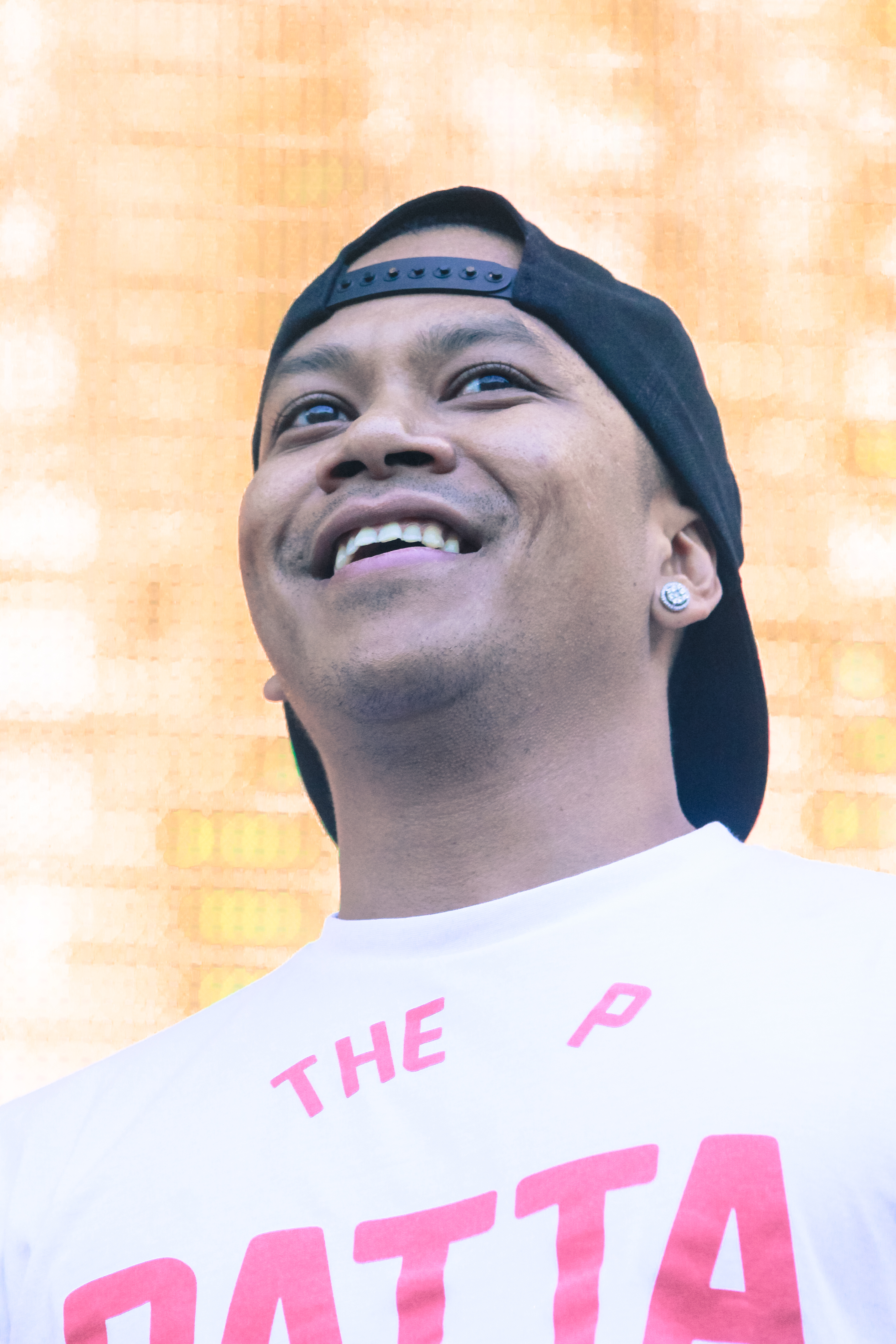 Electric Love Festival